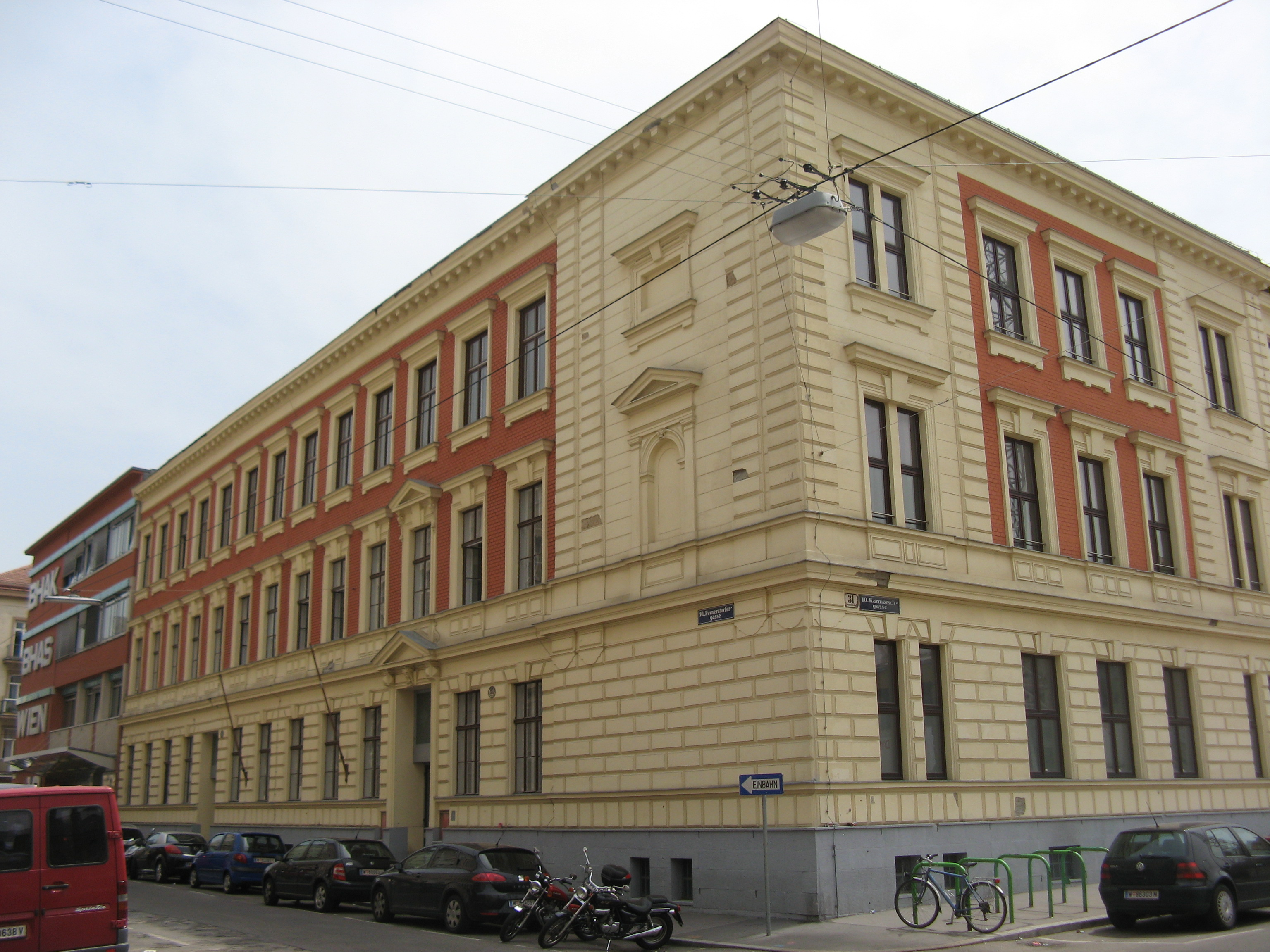 Handelsakademie (1888), Pernerstorfergasse 79-81, Wien-Favoriten